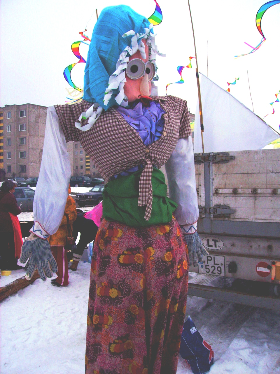 Morė